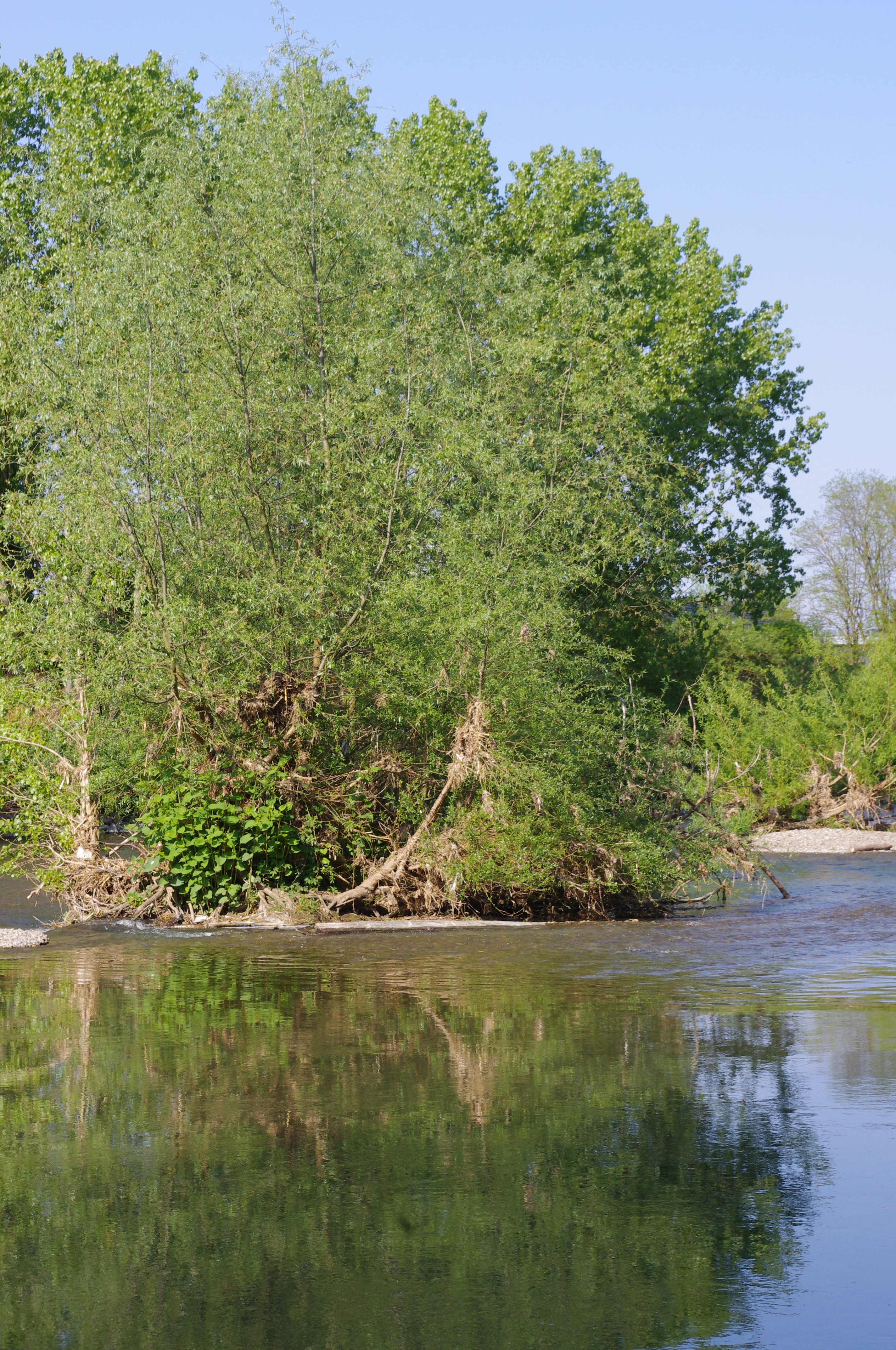 pour projet villes et villages de France